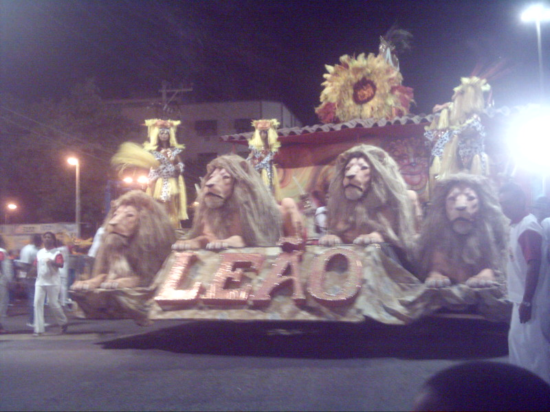 Escola de samba Leão de Nova Iguaçu, carro abre-alas, carnaval 2009. Desfile da quinta divisão do carnaval do Rio de Janeiro, na Intendente Magalhães.